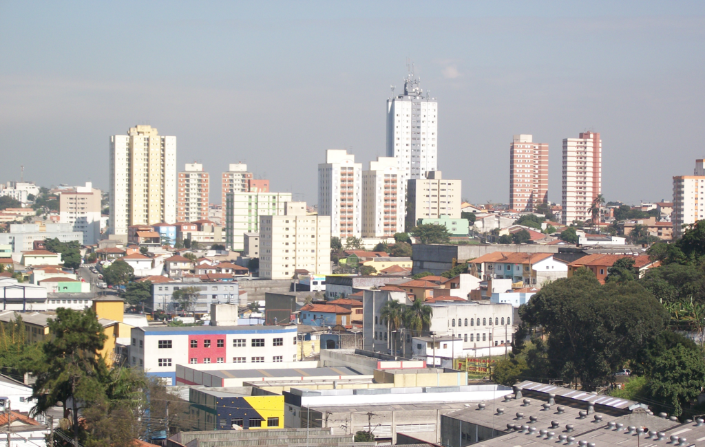 Vista aérea parcial do centro de Diadema.